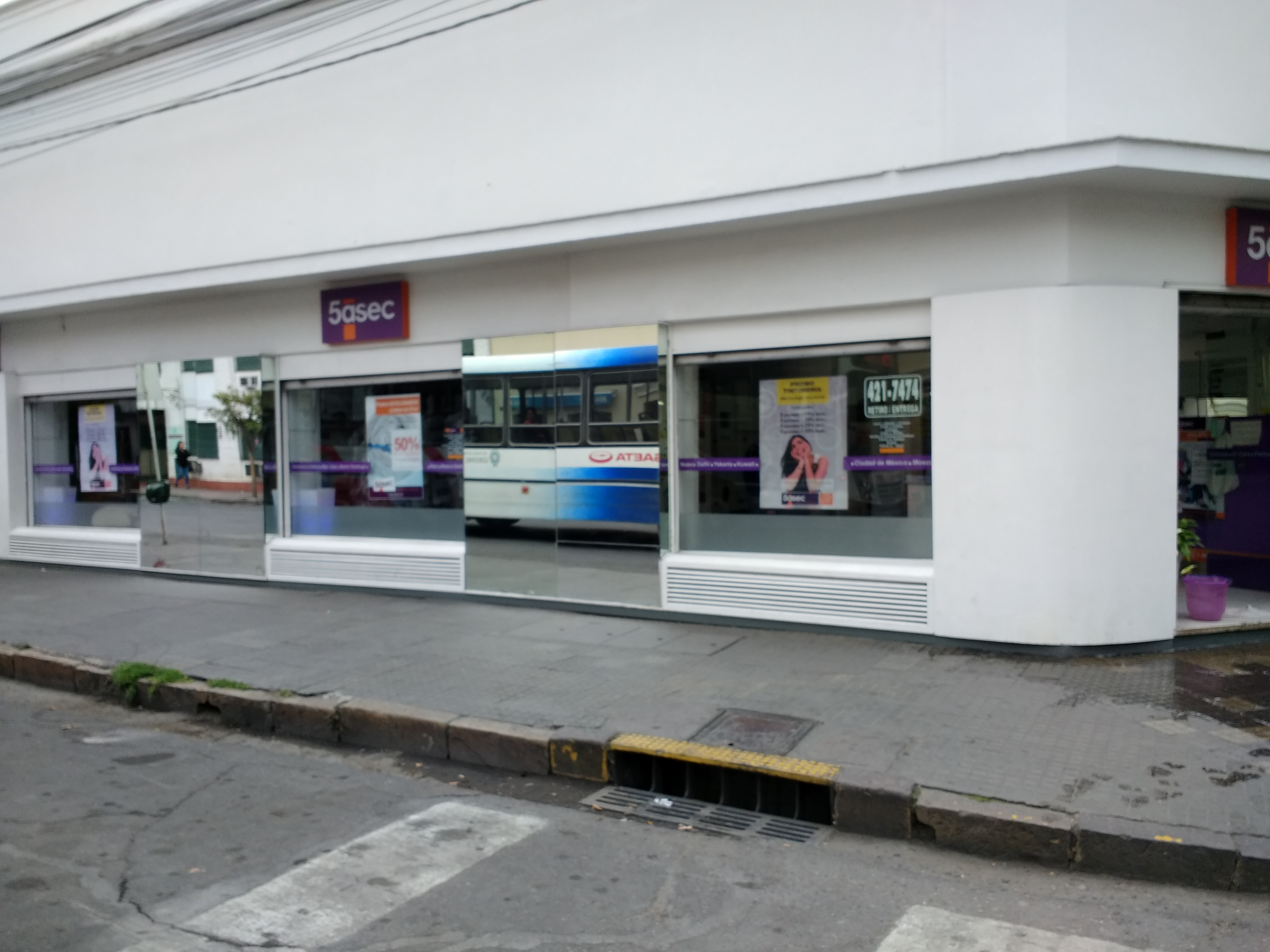 5asec, Mitre 401, Salta, Argentina.